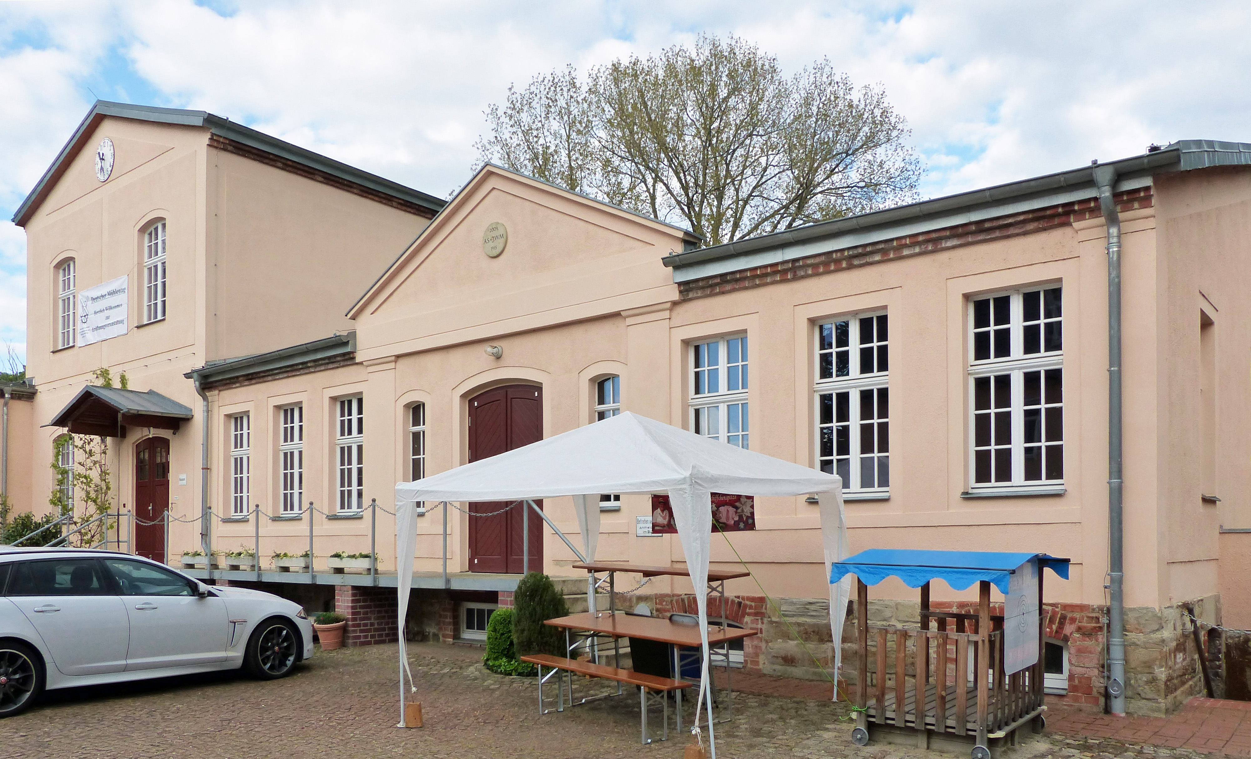 Denkmalgeschützte Eisenmühle in Elstertrebnitz, OT Oderwitz